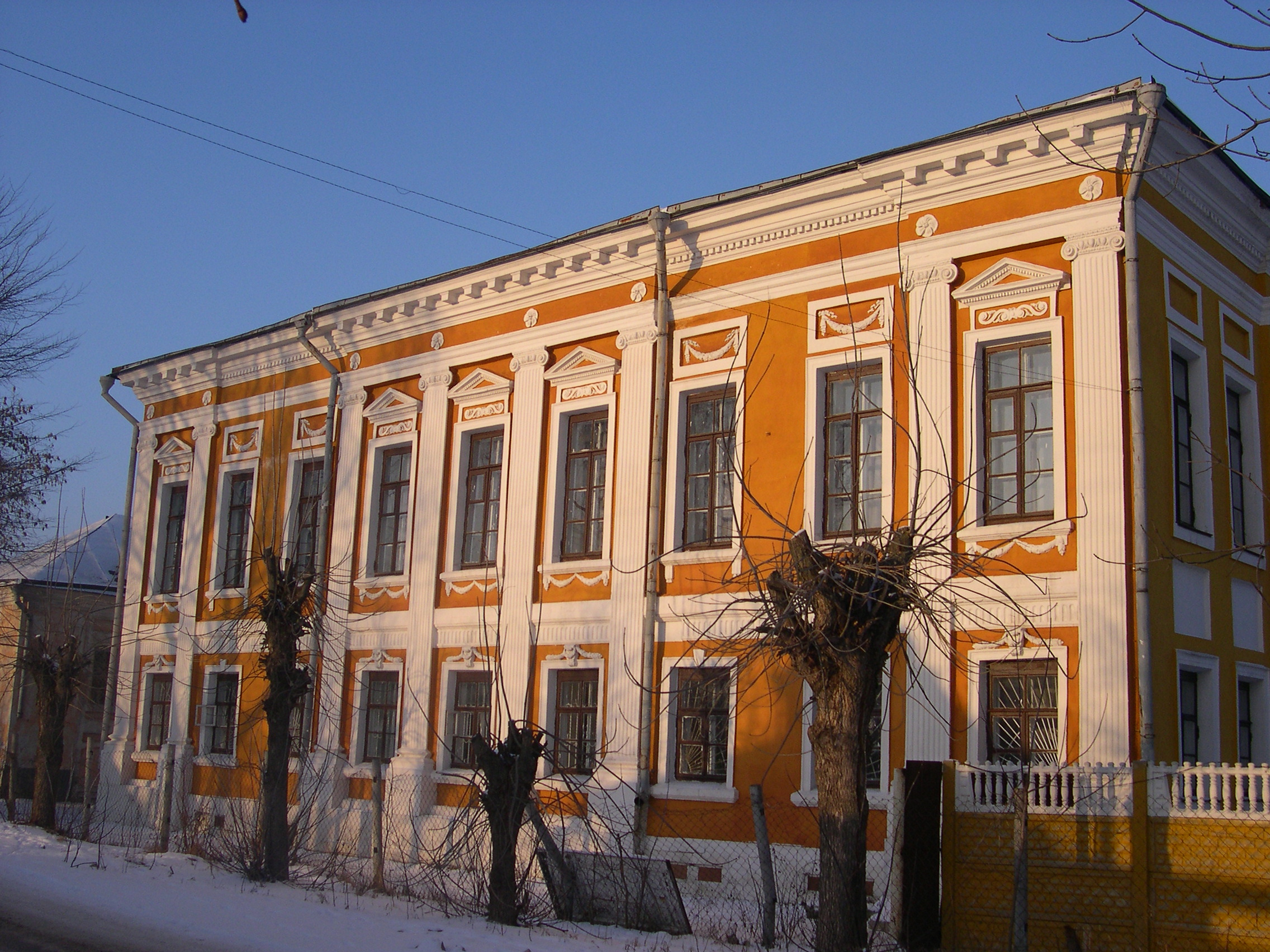 Дом купцов первой гильдии А. И. и И. А. Толчёновых (построен в 1785-1788), проданный в 1796 купцу первой гильдии И. А. Тугаринову, после чего стал известен как «Тугаринов дом». Дмитров, Московская область.